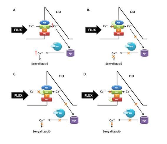 Representació del del complex policistina FPC en el cili primari. (A) Un fluid de flux estimulat, produeix un estrés de tall mecànic que es transmet a la cèl•lula via les proteïnes de la membrana del cili, que conseqüentment activen els canals de calci com el PC2 i permeten que el calci entri i així, activi el receptor de ryanodine (RyR) i aquest flux de calci indueixen un mecanismo intracel•lular de senyalització. (B i C) Els malfuncionaments dels complexos proteïcs PC1/PC2 suprimeixen la senyal d’entrada del Ca++. (D) Bloquejant el FPC pot disminuir la senyal de Ca++ degut a la modulació del complex de policsitna i la cascada dels efectors com el RyR, BB i el cos basal. X representen molecules desconegudes.